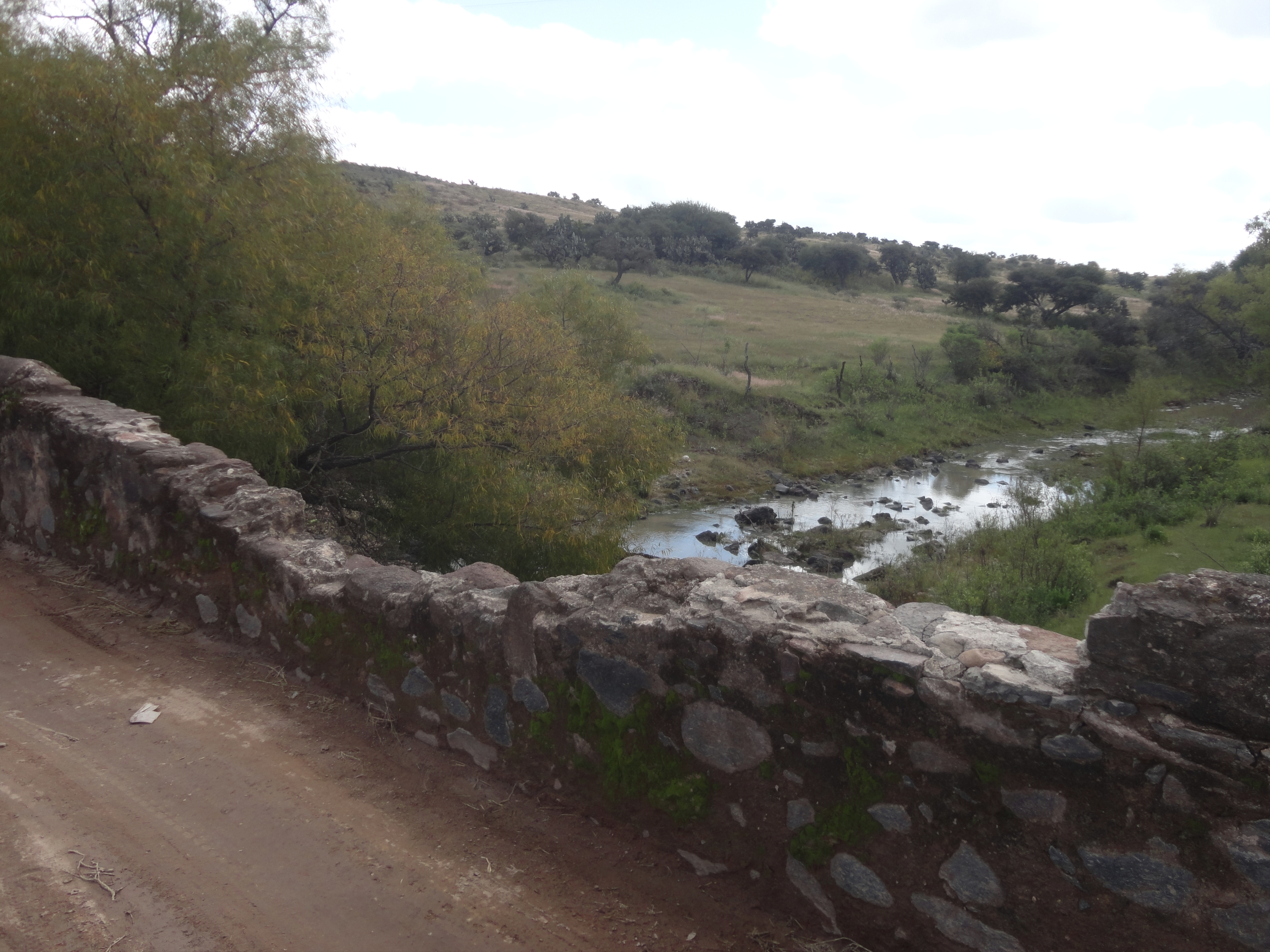 Puente La Quemada - San Felipe, Guanajuato, México - Camino Real de Tierra Adentro